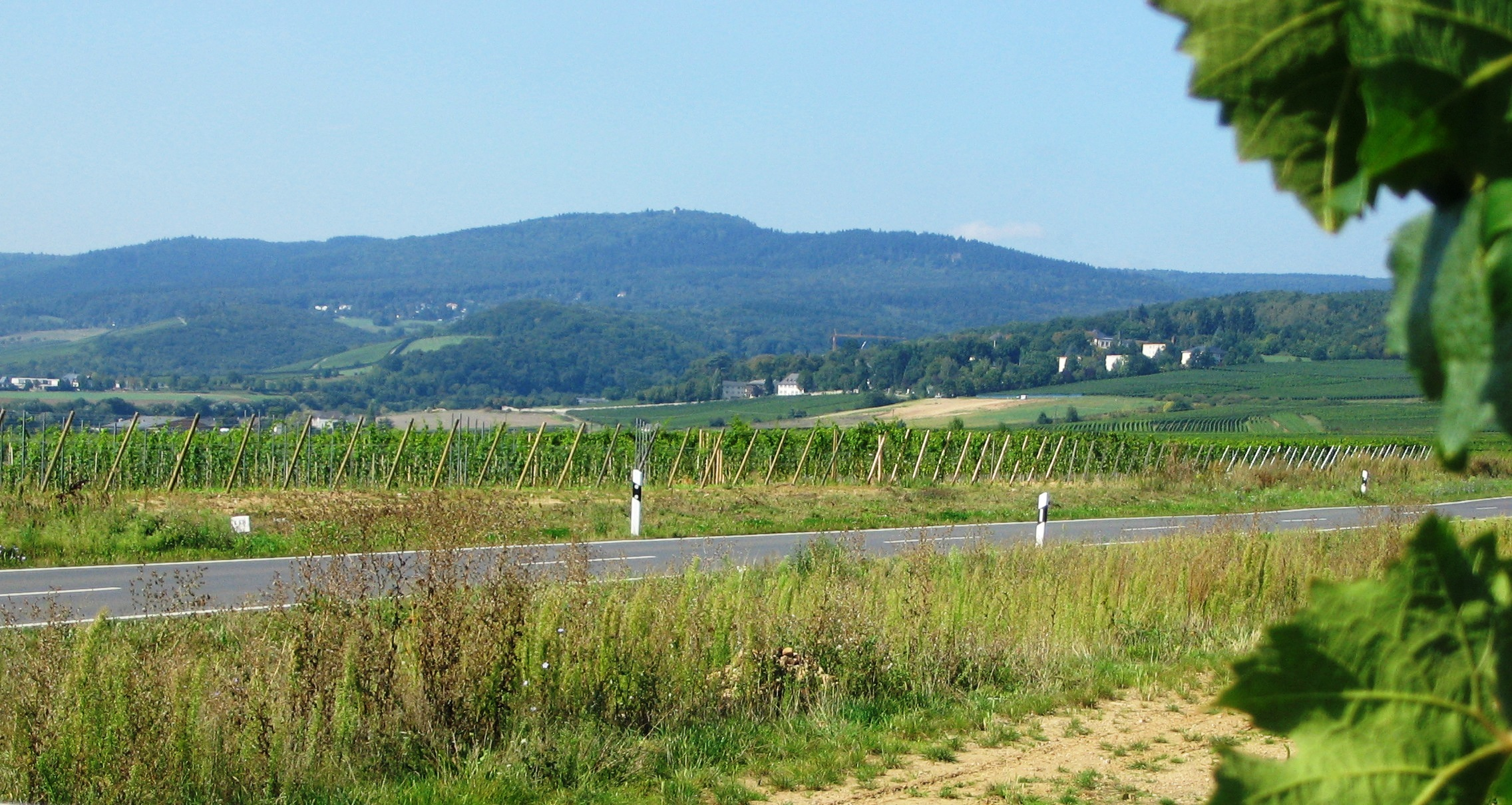 Blick aus dem Rheingau auf den Taunshauptkamm mit Hallgarter Zange. Rechts das Psychiatrische Klinikum Eichberg. Im Wald versteckt, nur durch einen Baukran erkennbar, die Lage des Klosters Eberbach.